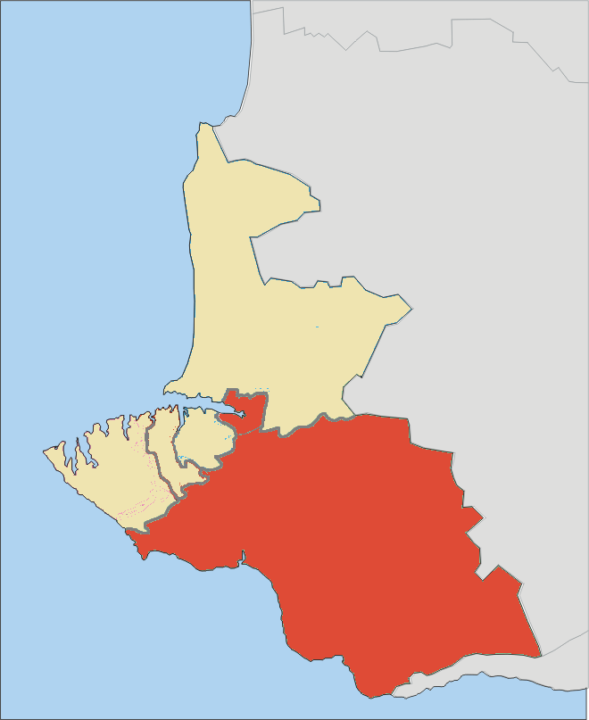 Балаклавский район Севастополя